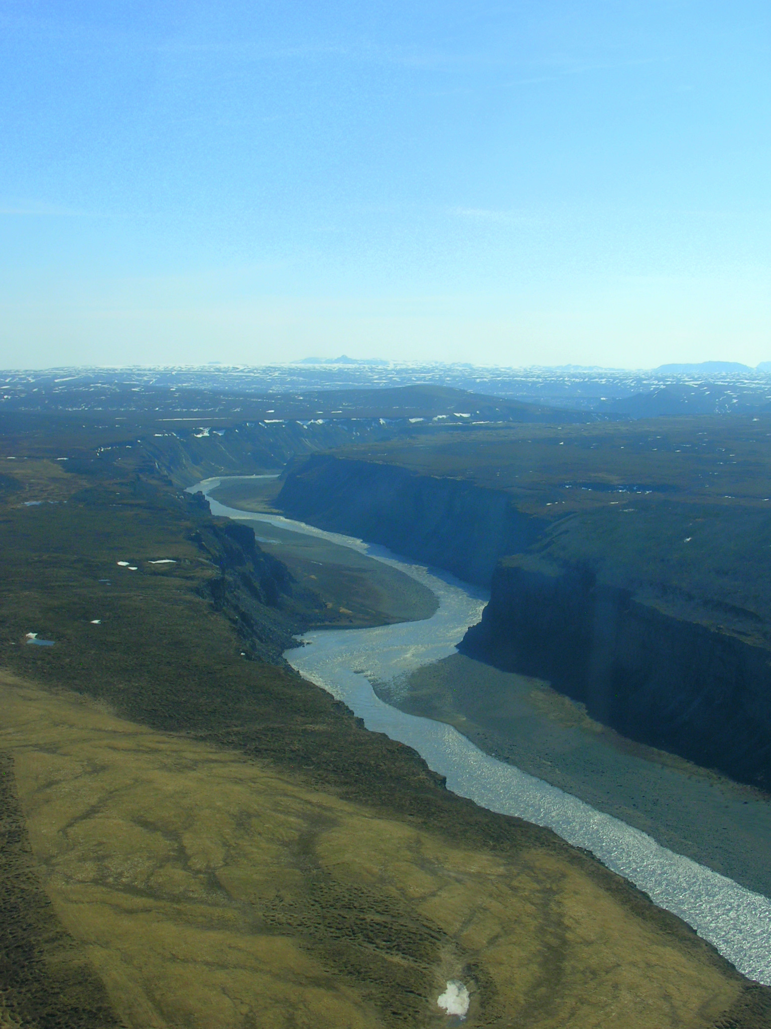 Aerial View of Jökulsá á Fjöllum